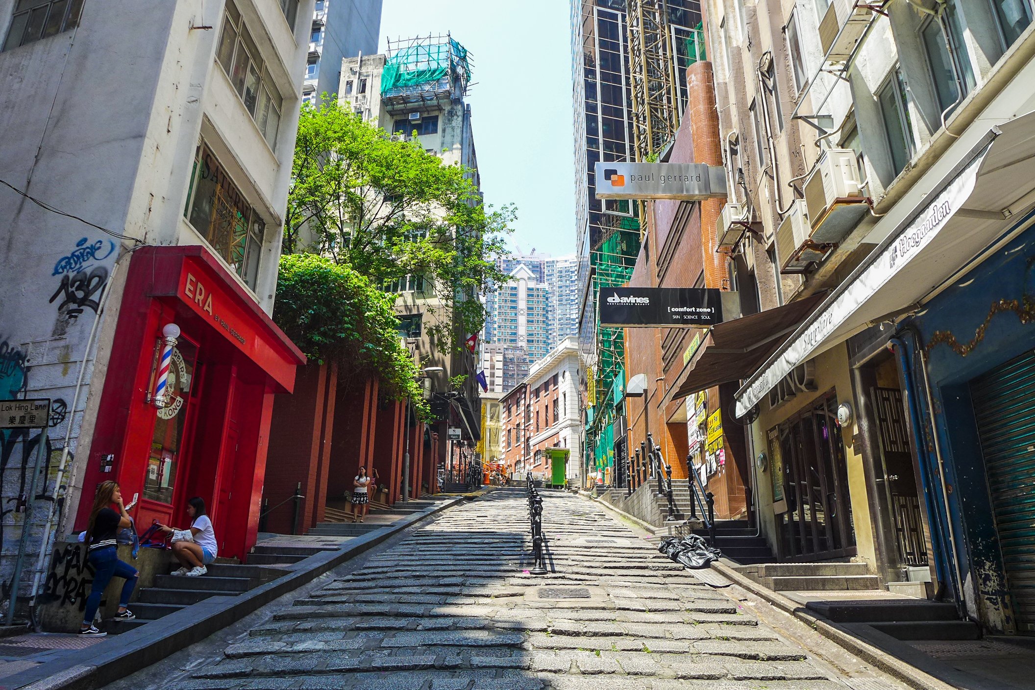 Pottinger Street